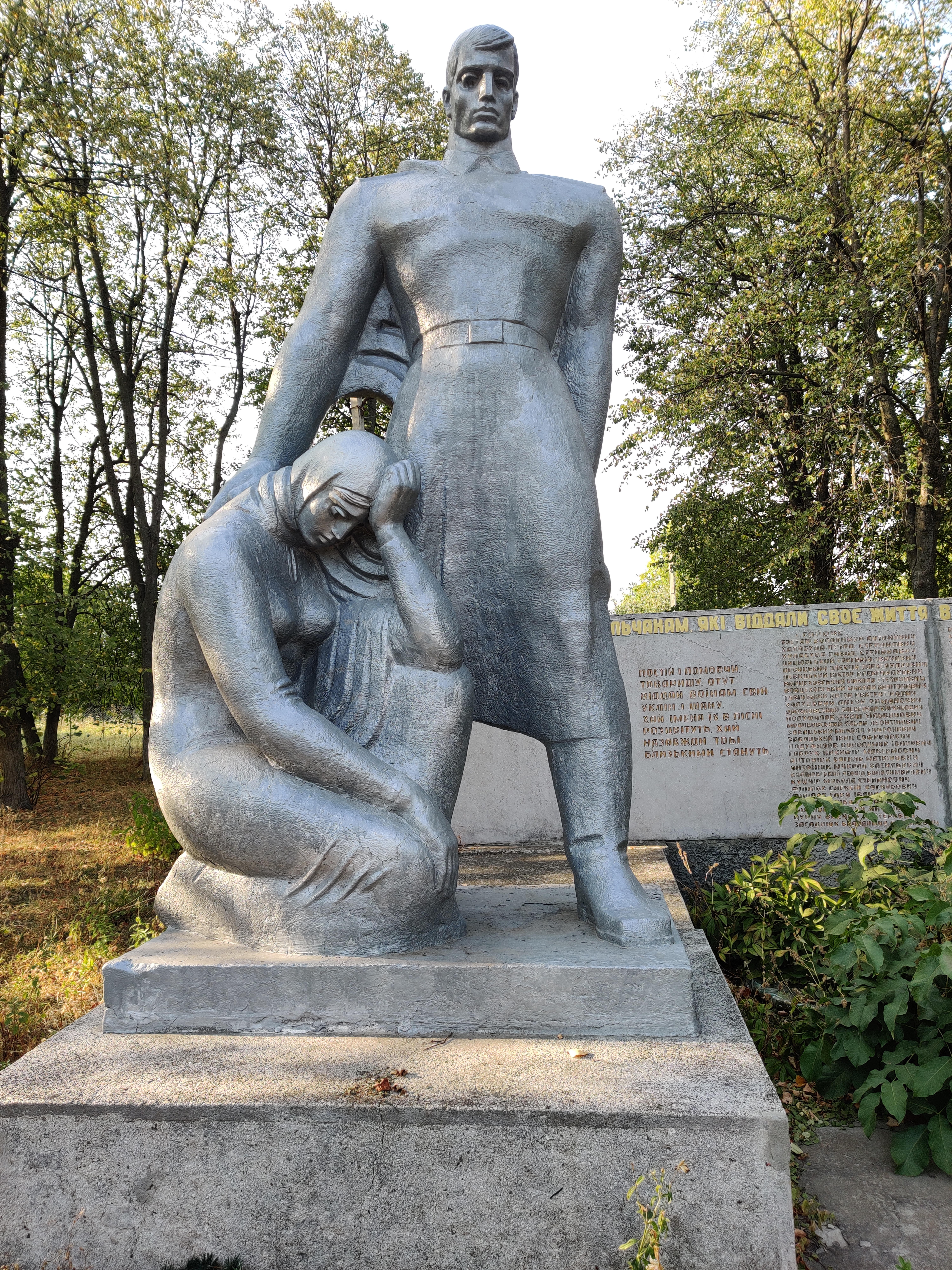 Пам'ятник 103 воїнам-односельчанам, загиблим на фронтах Великої Вітчизняної війни, Гайове, біля Будинку культури